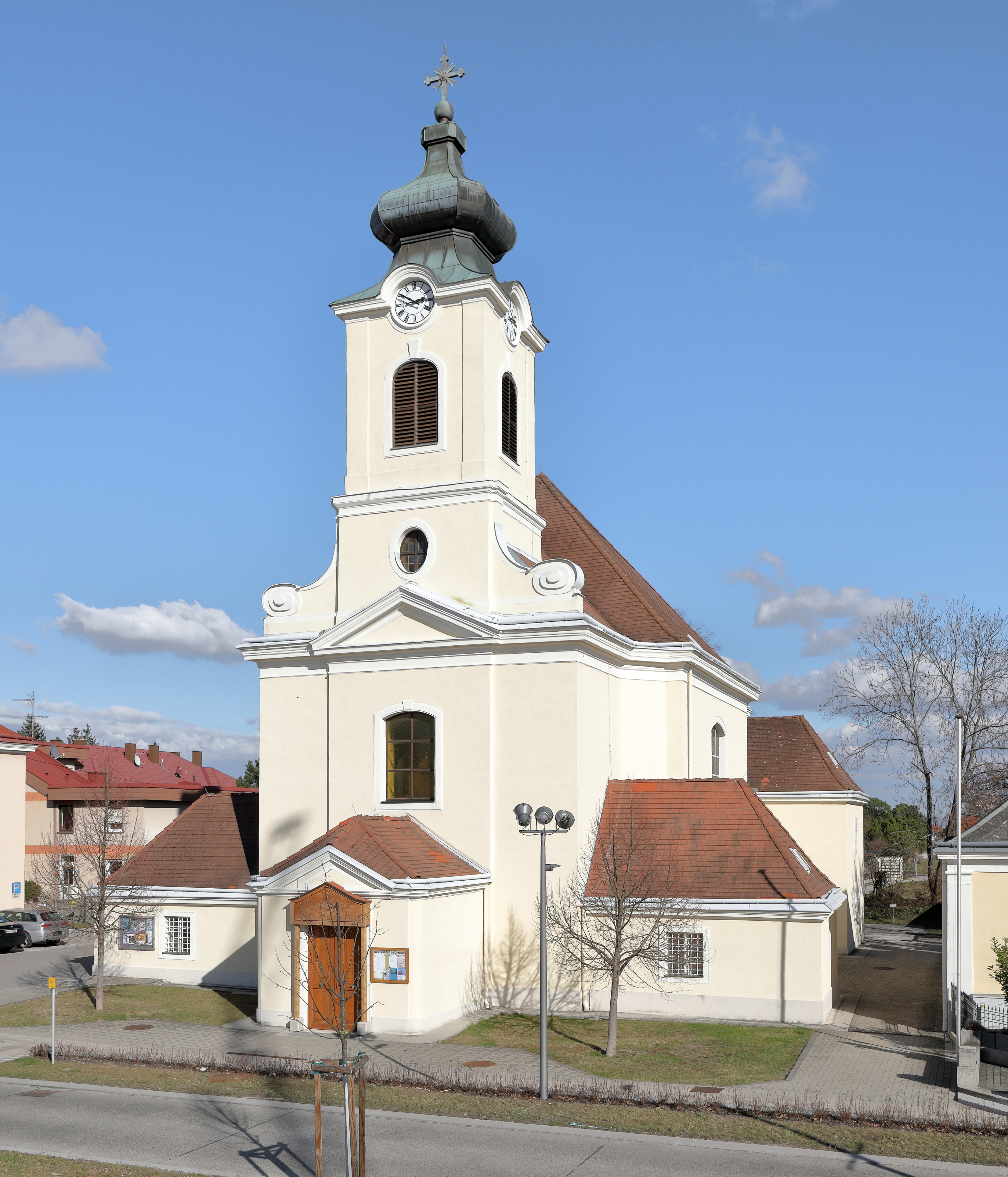 Westansicht der röm.-kath. Kirche hl. Kreuz in der niederösterreichischen Marktgemeinde Theresienfeld.Die Ortschaft Theresienfeld wurde 1763 über Anordnung Kaiserin Maria Theresias gegründet. In diesem Zuge wurde auch eine Pfarrkirche ab 1767 nach den Plänen des Architekten Josef Gerl errichtet. Die Einweihung des spätbarocken, längszentralen Sakralbaues mit annähernd quadratischem Langhaus und einer Westturmfassade erfolgte am 20. Oktober 1768 im Beisein der Kaiserin Maria Theresia.